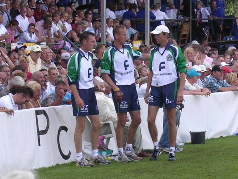 De earste priis winners fan de PC fan 2008